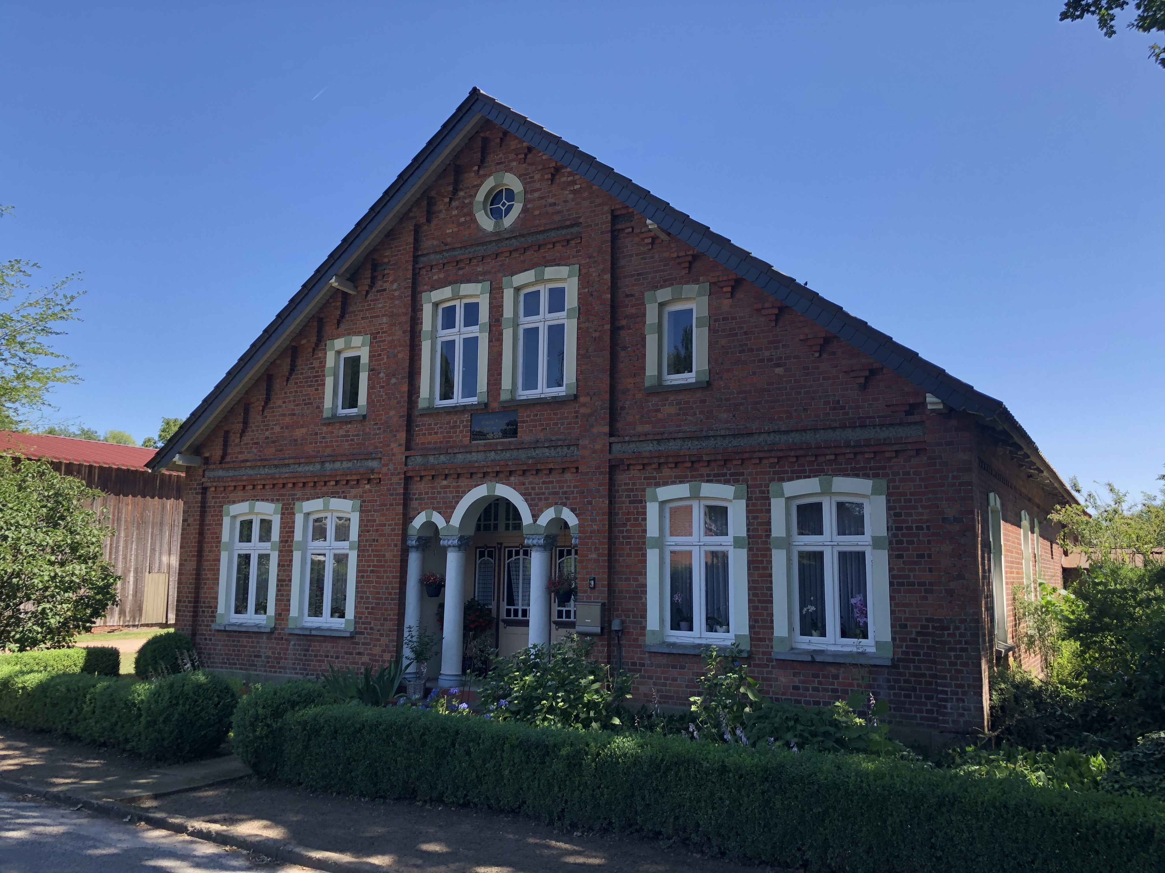 Huus in Lütt Woonst